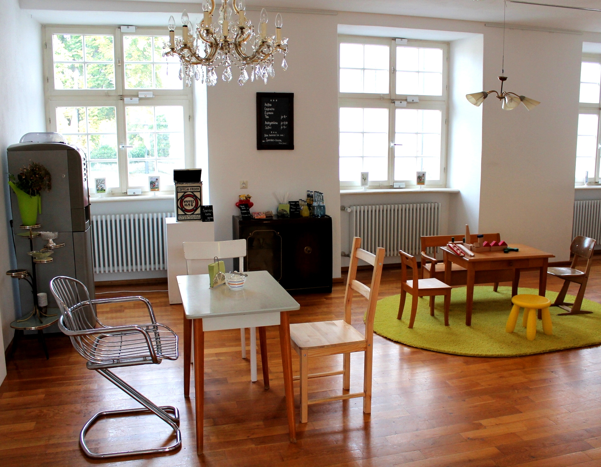 Waldenbucgh, Café Alltag im Museum der Alltagskultur